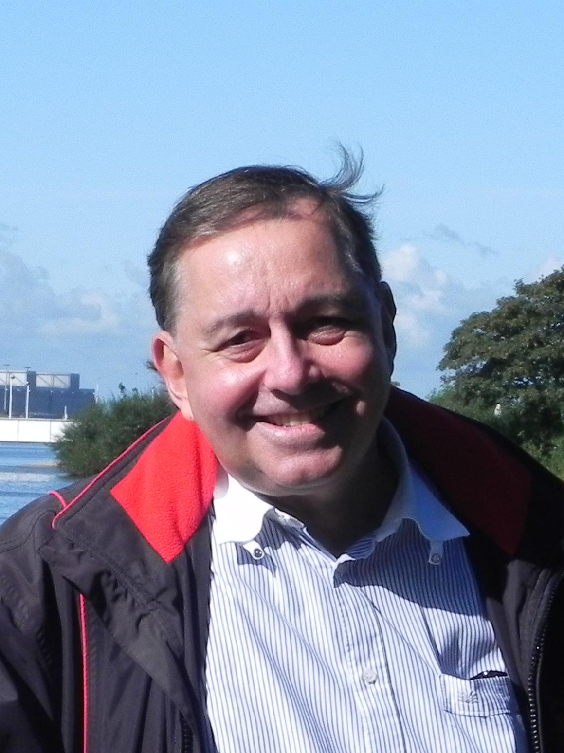 Porträt von Götz Warnke